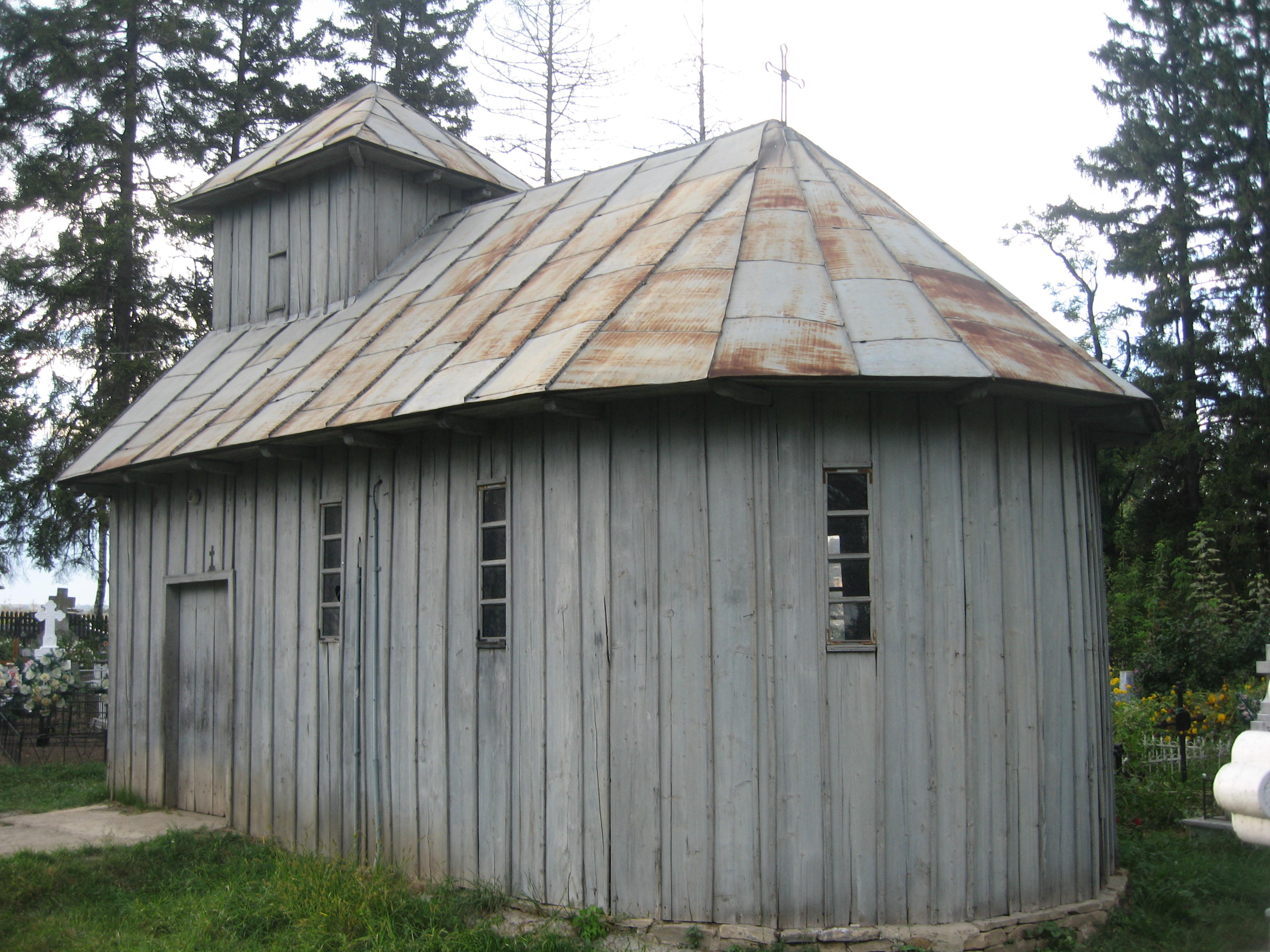 Biserica de lemn din Zvoristea